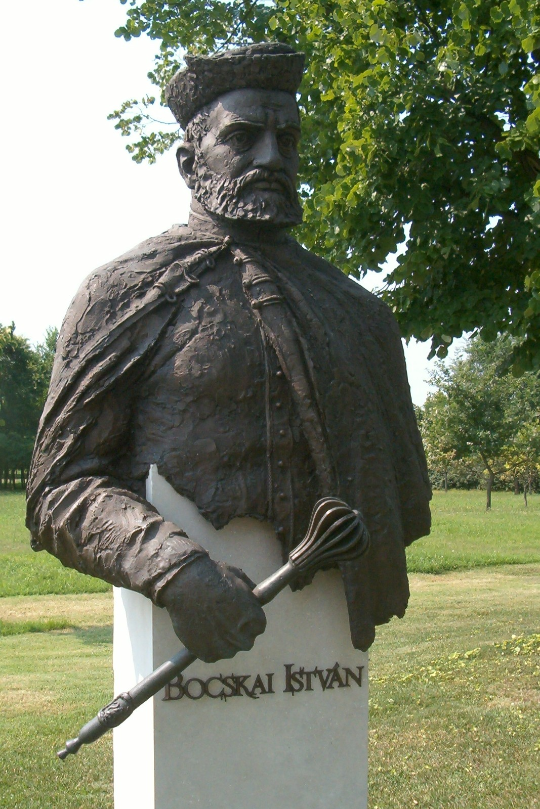 Bocskai István Nemzeti Történeti Emlékpark / National Historical Memorial Park in Ópusztaszer, Hungary (Győrfi Lajos alkotása) self shot photo (2005), Váradi Zsolt